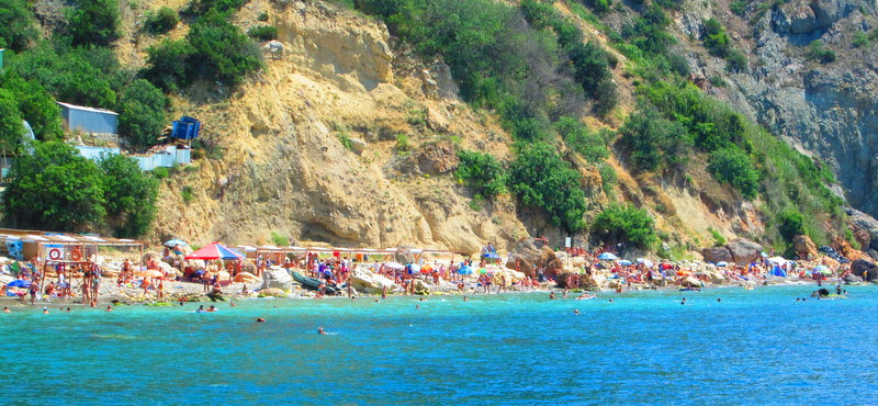 Яшмовий пляж